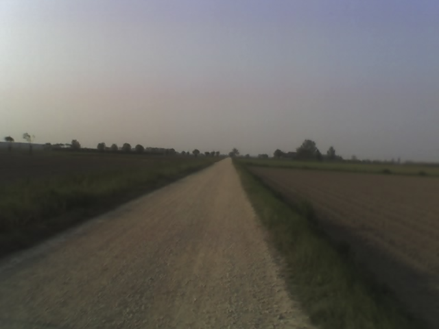 "Grandi Valli Veronesi" nel territorio del comune di Villa Bartolomea